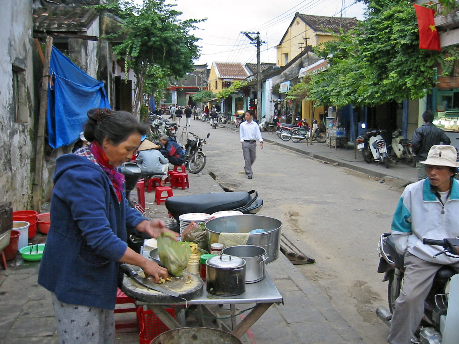 Cookshop in Huế, Vietnam